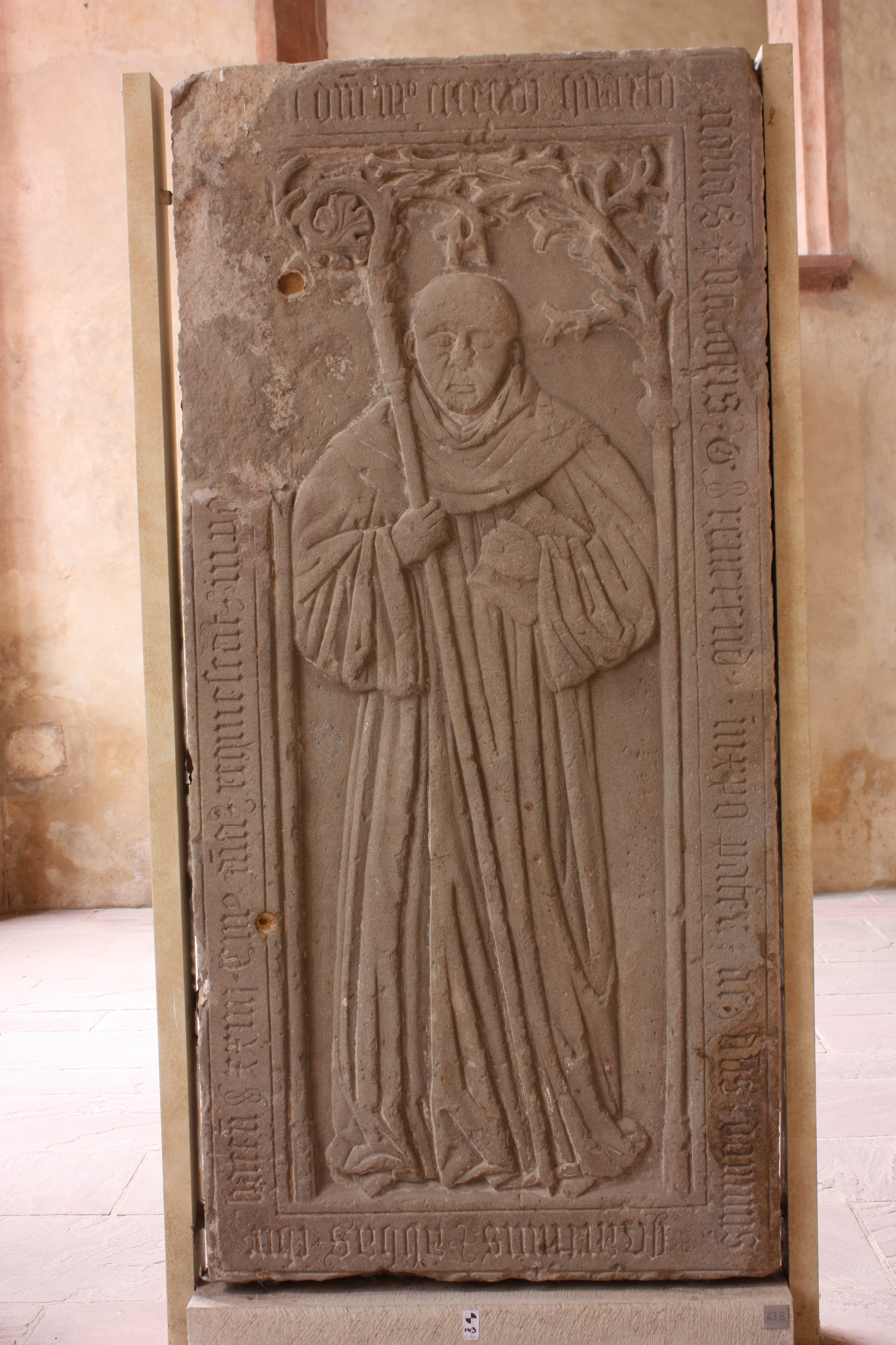 Grabplatte Nr. 43b des Abt Martin Rifflinck aus Boppard in der Basilika des Kloster Eberbach